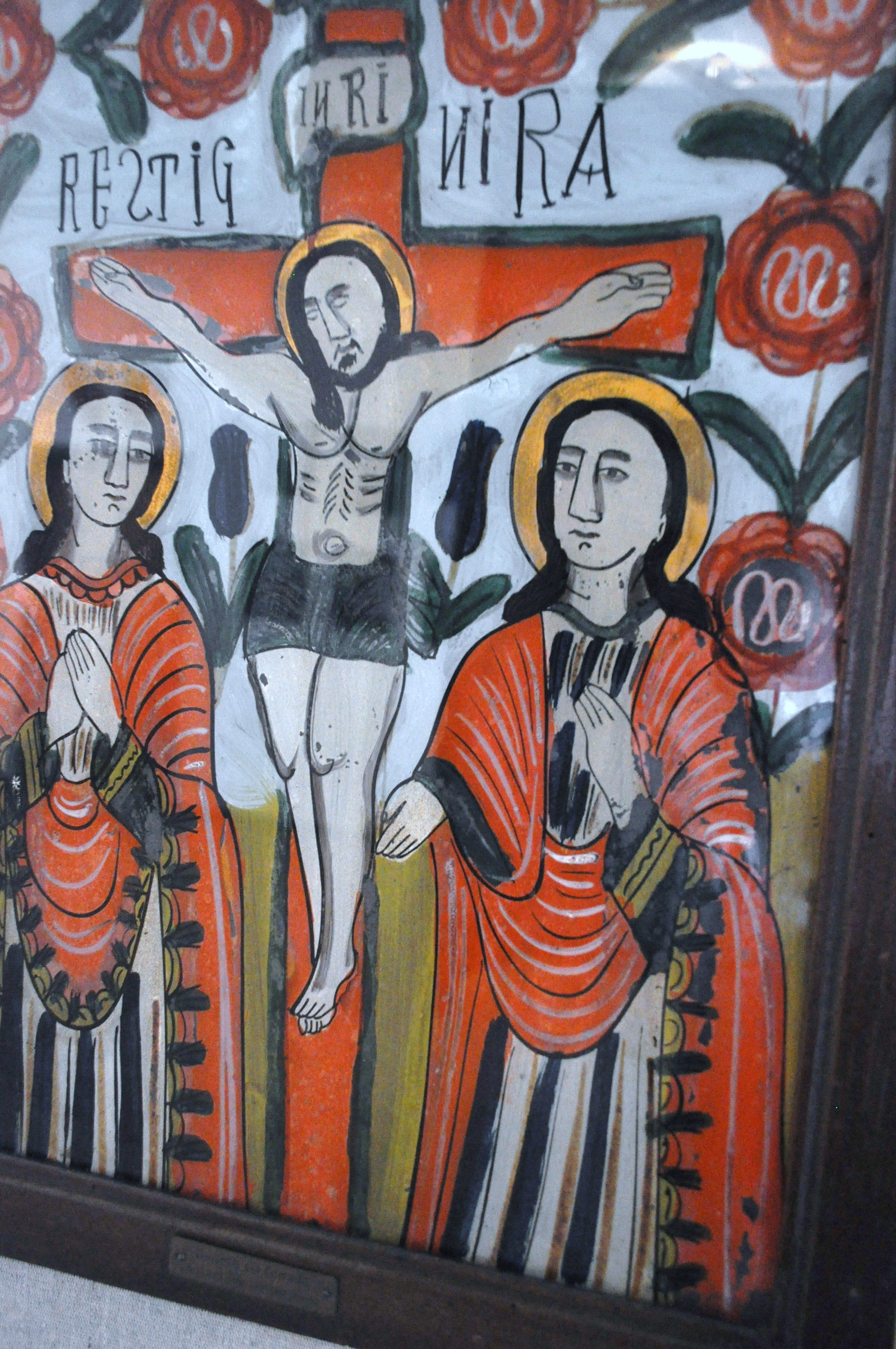 Muzeul de icoane pe sticlă „Pr.Zosim Oancea” din Sibiel